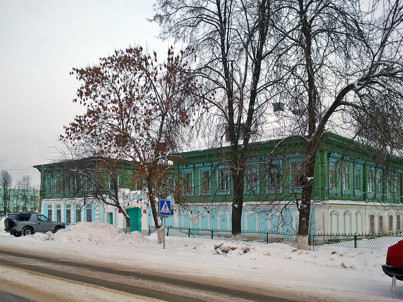 усадьба Шагина Ф.: улица Ленина, 105, 107, Воскресенское, Воскресенский район, Нижегородская область